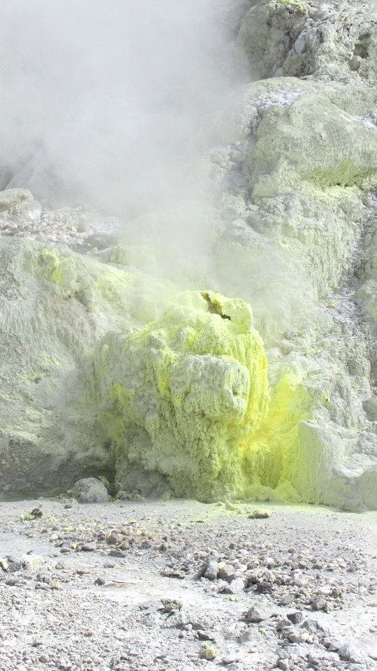 噴気孔と硫黄（秋田県、玉川温泉、源泉）